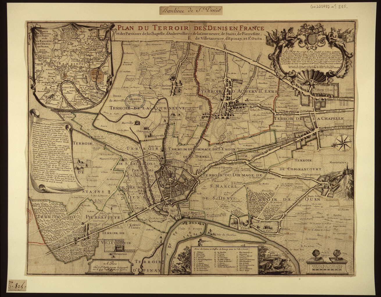 Plan du terroir de St Denis en France et des paroisses de la Chapelle, d'Aubervilliers, de la Courneuve, de Stains, de Pierrefitte, de Villetaneuse, d'Epinay, et St. Ouën. Titre : Plan du terroir de St Denis en France et des paroisses de la Chapelle, d'Aubervilliers, de la Cour-neuve, de Stains, de Pierrefitte, de Villetaneuse, d'Epinay, et St. Ouën / par P. Loriot Auteur : Loriot, P. (16..-17.. ; arpenteur juré). Cartographe Auteur : Inselin, Charles (1673-17..). Graveur Éditeur : Chez le Sr Inselin (A Paris) Date d'édition : 1707 Sujet : Saint-Denis, Terroir de ; Paris ; Aubervilliers, Terroir de ; La Courneuve, Terroir de ; Saint-Ouen, Terroir de ; Villetaneuse, Terroir de ; Stains, Terroir de ; Paris -- Faubourgs ; Épinay, Terroir d' ; Pierrefitte, Terroir de Type : carte Type : image fixe Langue : français Langue : français Format : 1 plan : tracés col. ; 46,5 x 60 cm Format : image/jpeg Description : Appartient à l’ensemble documentaire : AnvilFr Description : Appartient à l’ensemble documentaire : IledeFr1 Droits : domaine public Identifiant : ark:/12148/btv1b7710706r Source : Bibliothèque nationale de France, département Cartes et plans, CPL GE DD-2987 (825) Couverture : France – Île-de-France – Paris Notice d'ensemble : Notice d'ensemble : Notice de recueil : Notice d'ensemble : Appartient à : Collection d'Anville ; 00825 Provenance : Bibliothèque nationale de France Date de mise en ligne : 15/10/2007